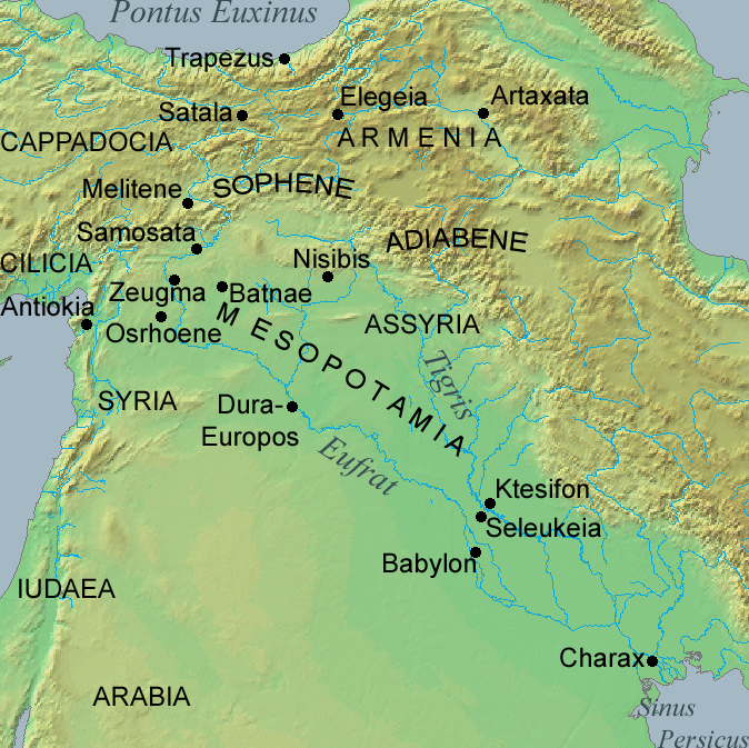 Trajanuksen Parthian sota, Trajan's Parthian war